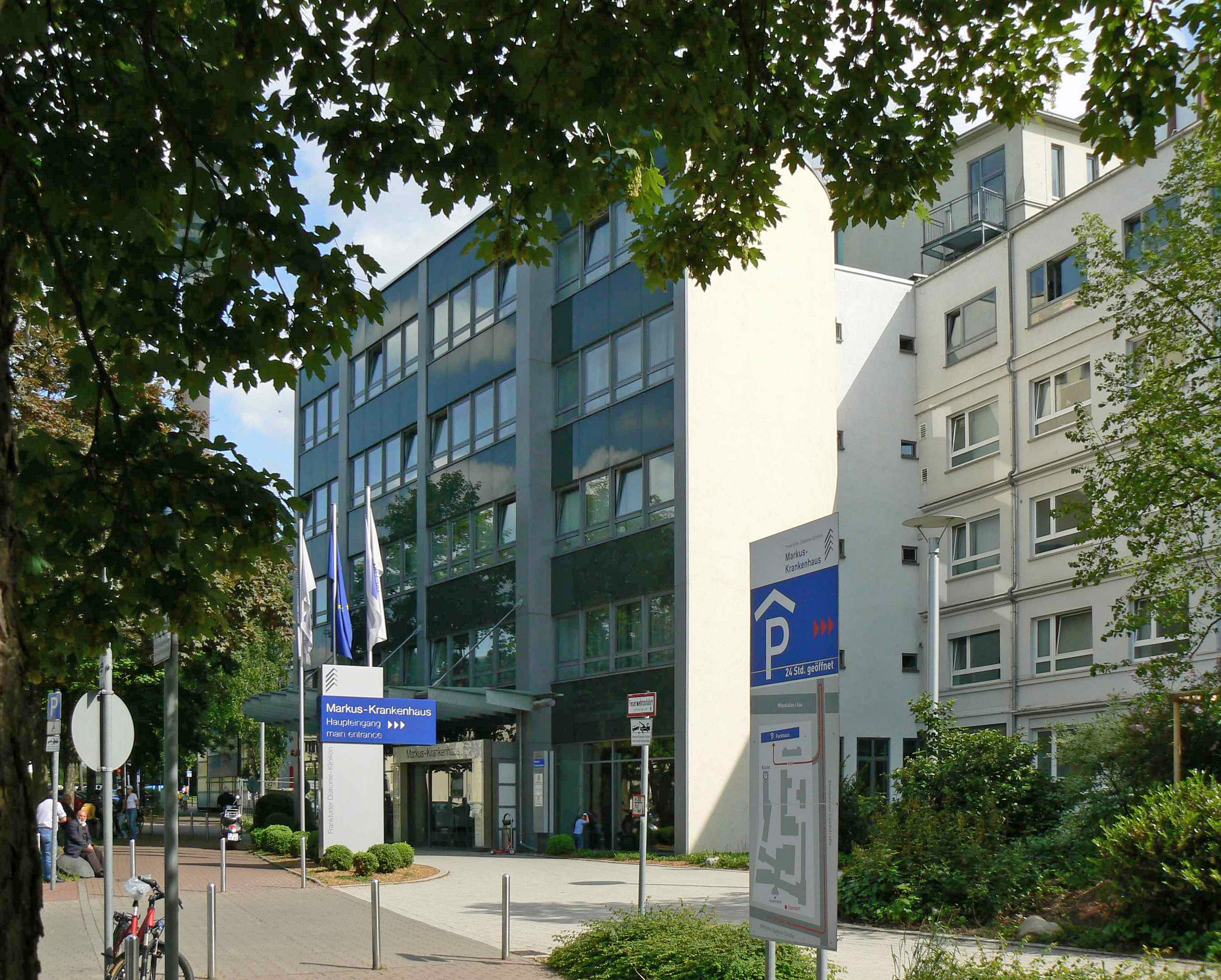 Markus-Krankenhaus in der Wilhelm-Epstein-Straße